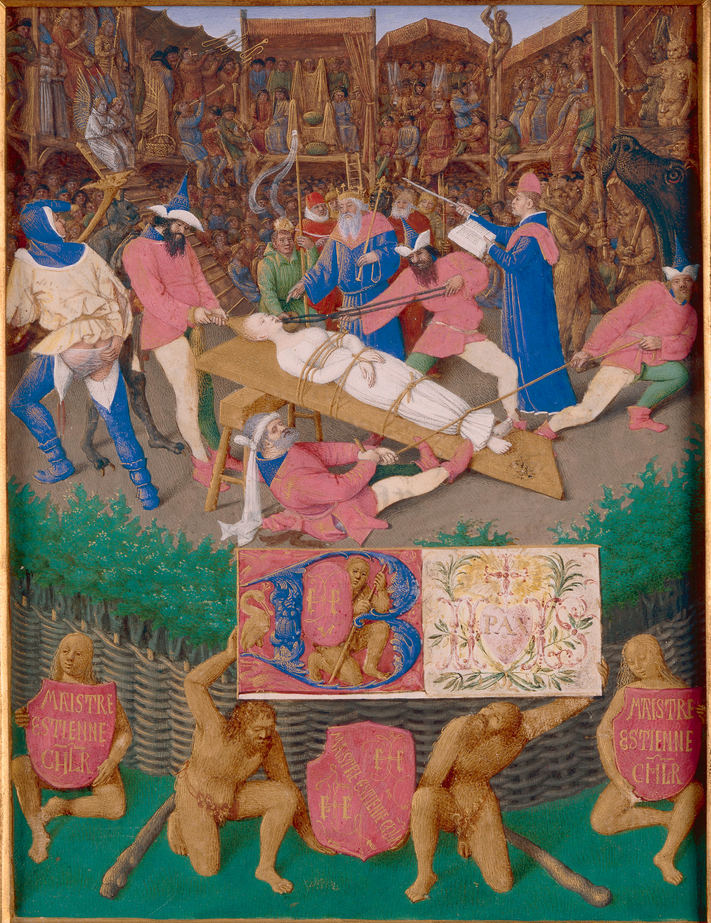 Sainte Apolline, Heures d'Étienne Chevalier, enluminées par Jean Fouquet. Musée Condé, Chantilly. Fouquet a mis en scène le martyre de sainte Apolline comme un mystère. Un rideau d'arbres doublé d'un clayonnage limite le devant de la scène. Avec des gestes démonstratifs, les bourreaux, sur l'ordre de Dèce, ligotent la martyre, lui immobilisent la tête en tirant ses cheveux et lui arrachent les dents. Tandis qu'un fou, au geste obscène, déambule avec sa marotte, le régisseur, baguette en main, dirige l'ensemble du jeu et les musiciens. Décor et tribunes ferment le théâtre : à gauche le paradis, au centre les spectateurs et à droite, l'enfer.